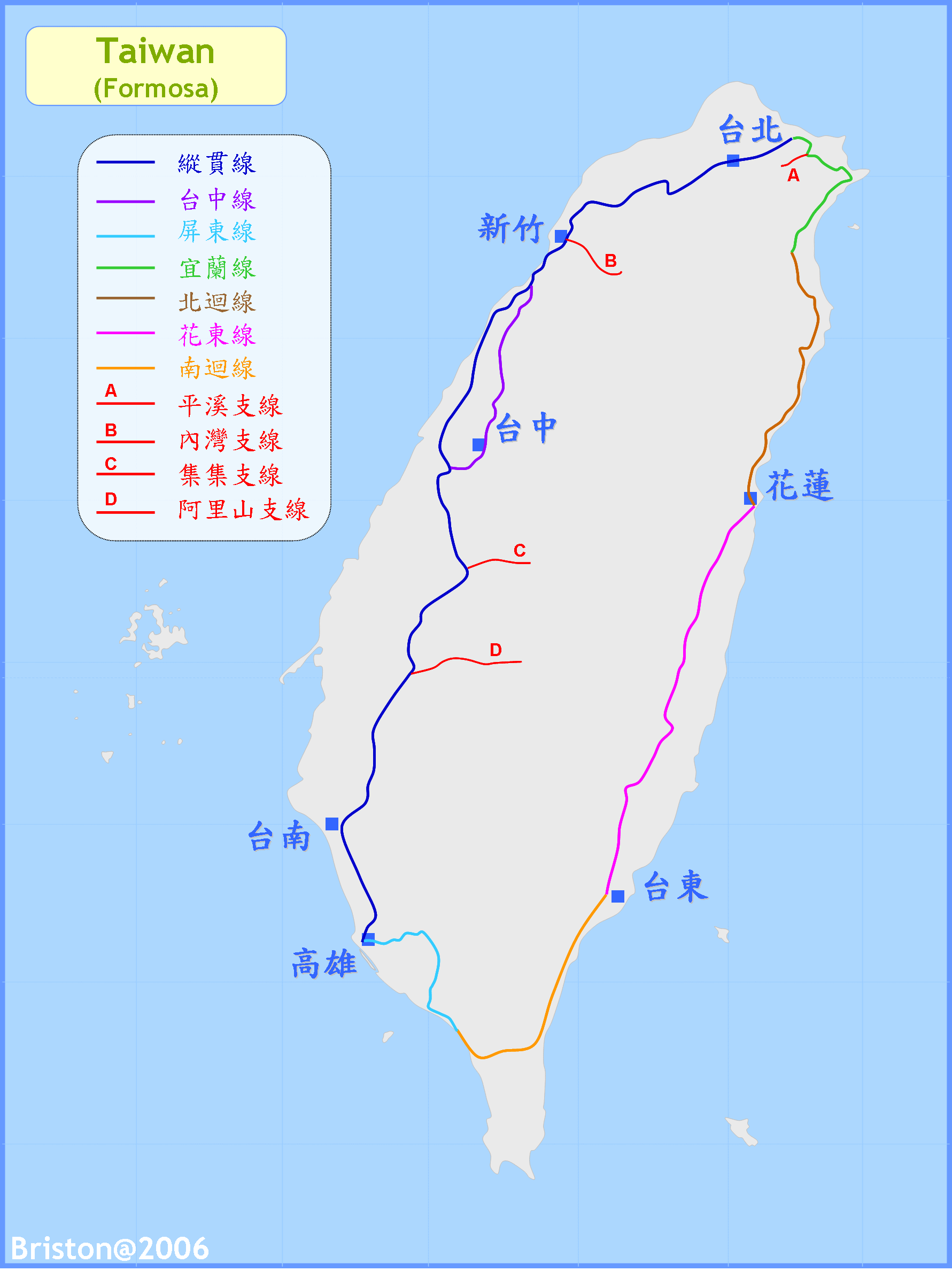 台湾鉄路管理局路線図。赤色の線のCが集集線である、紫色の線が台中線であ。台湾の環状鉄道（西部幹線・東部幹線・南廻線）下部のオレンジ色が南廻線。